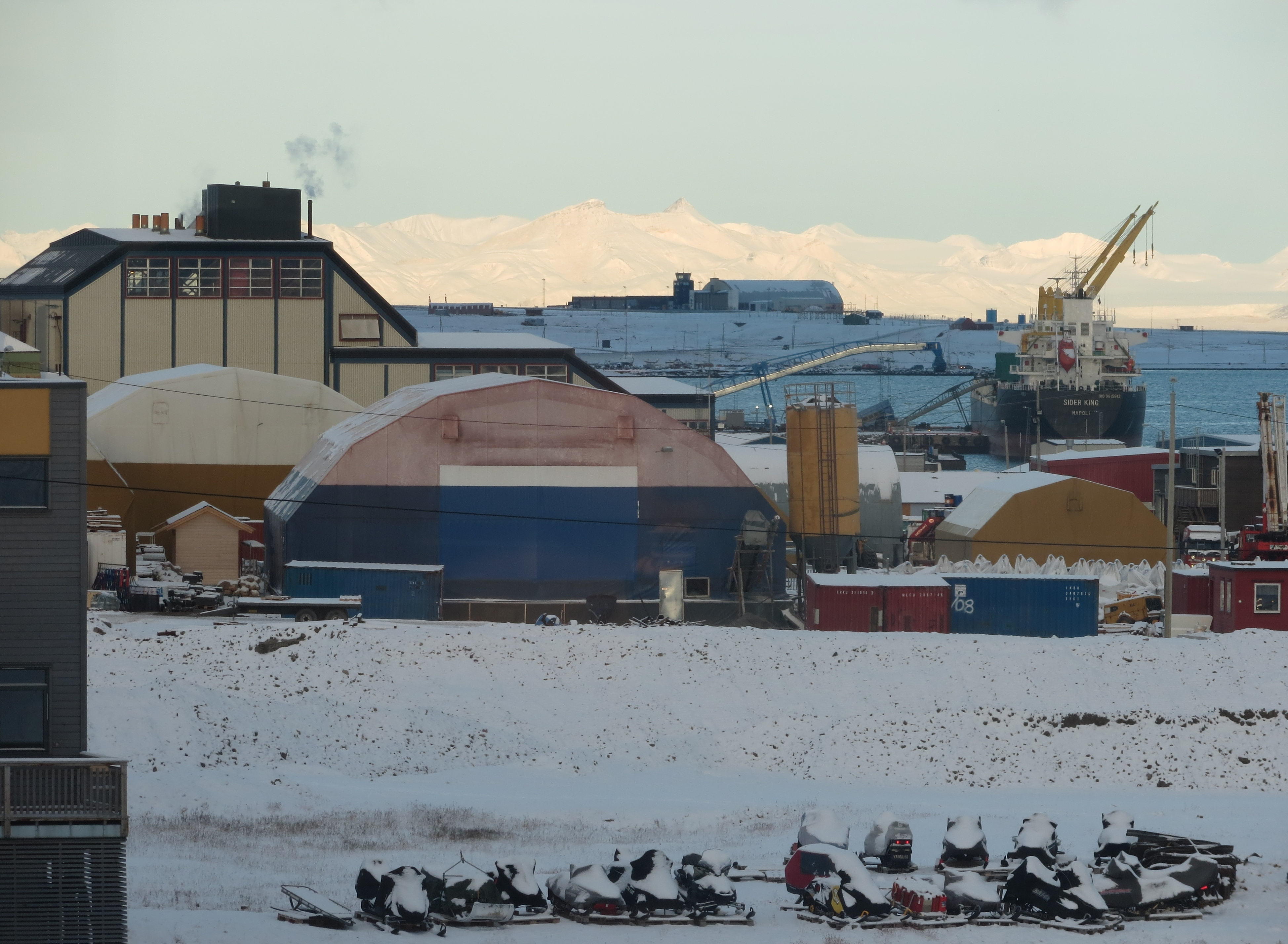 Sjöomraadet harbour area of Longyearbyen, in the Advent fjord. Spitsbergen, Norway.